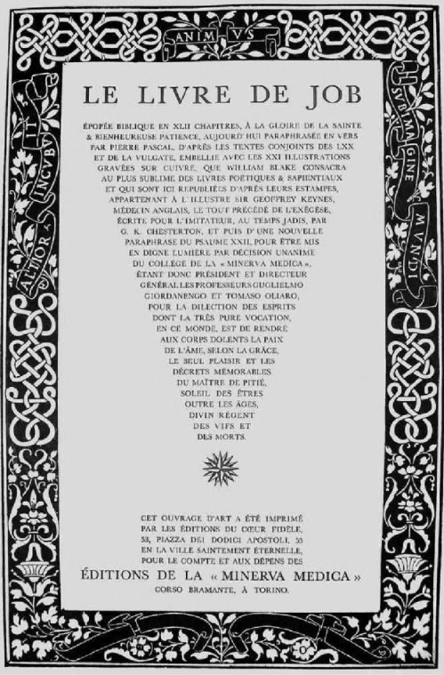 Frontespizio interno di "Le livre de Job", parafrasi in versi di Pierre Pascal, prefazione di Gilbert Keith Chesterton, Roma, Par les editions du Coeur fidele, 1967.